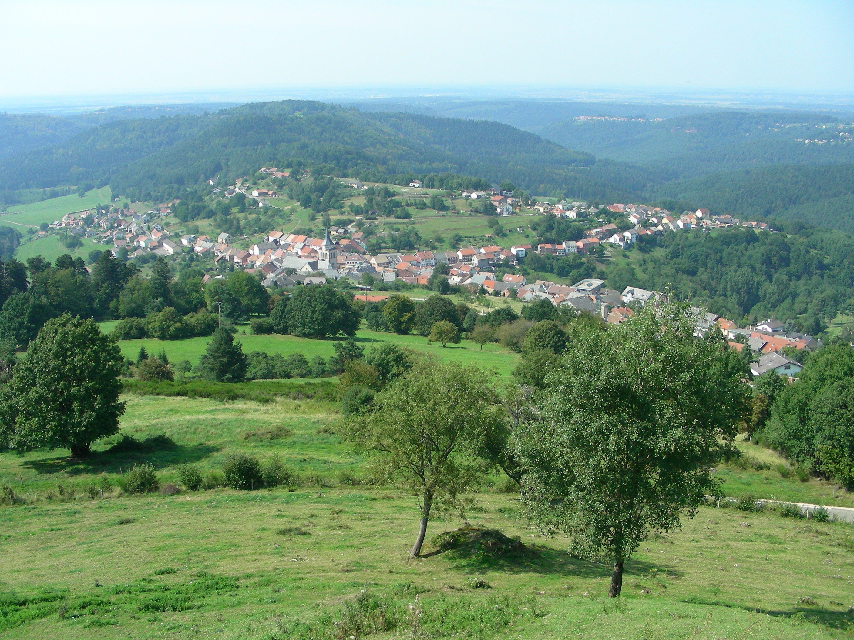 Dabo, in de Vogezen, richting WZW gezien vanaf de rocher de Dabo